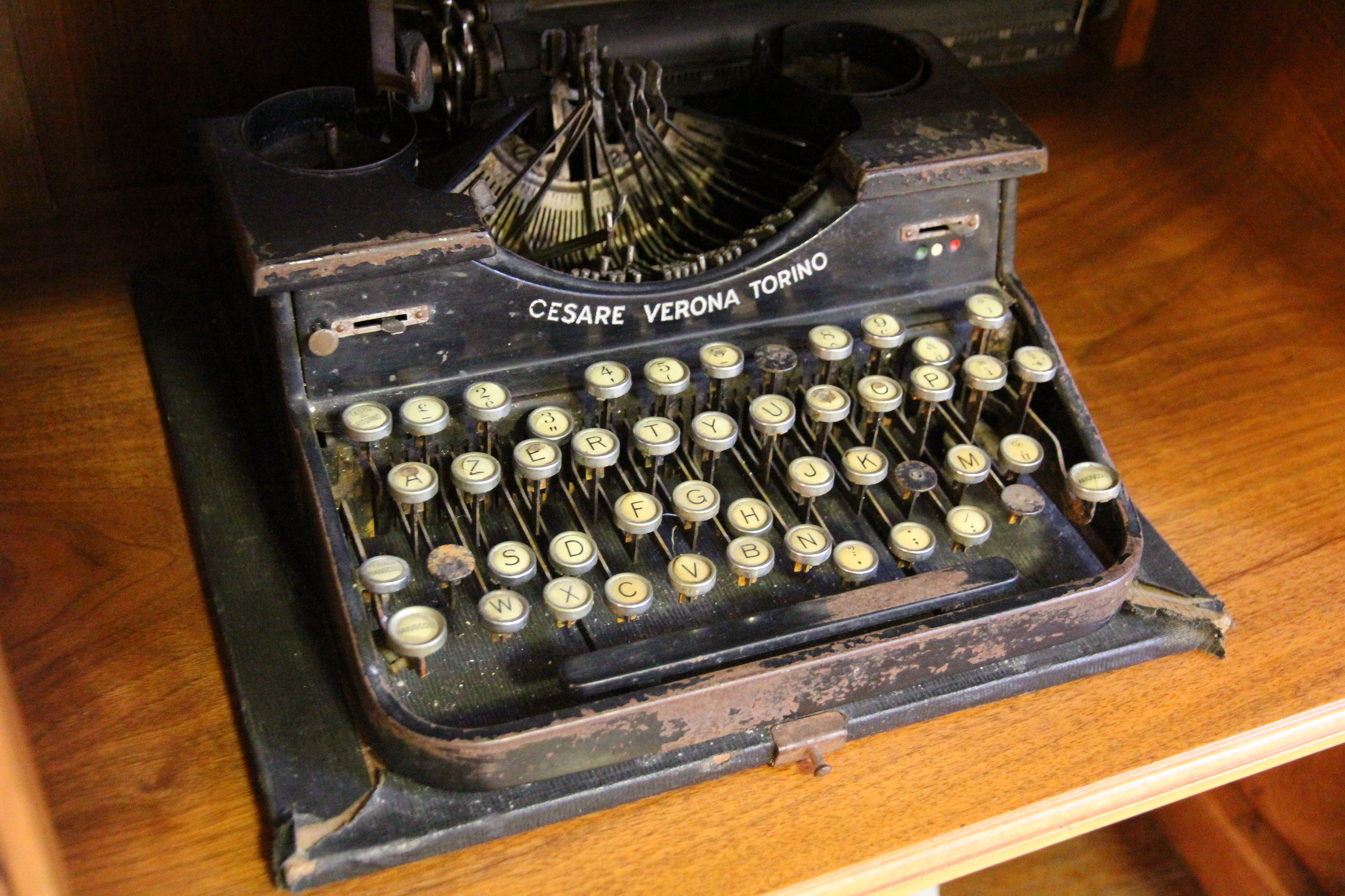 Sassari - Palazzo del Banco di Sardegna - Sede centrale